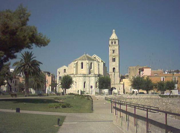 Retro basilica cattedrale barletta puglia